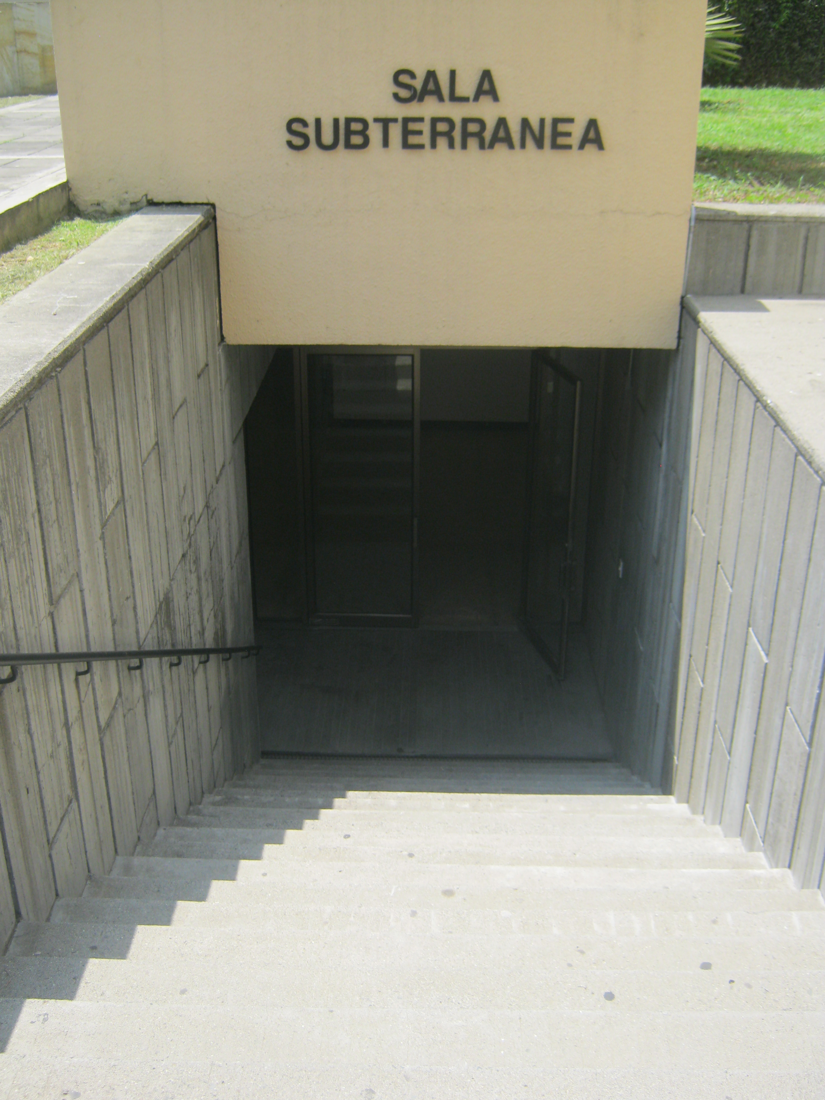 Museo La Tertulia